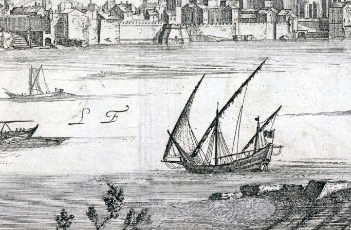 Vue d’Arles en 1660 (détail)Vestiges du pont romain dit de "Constantin", en bas et à droite de l'image.